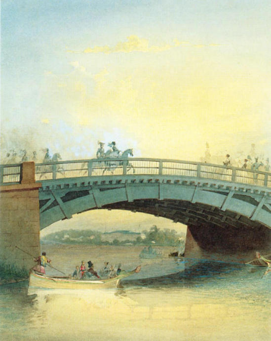 Каменноостровский мост, акварель В.С.Садовникова. 1830-е.